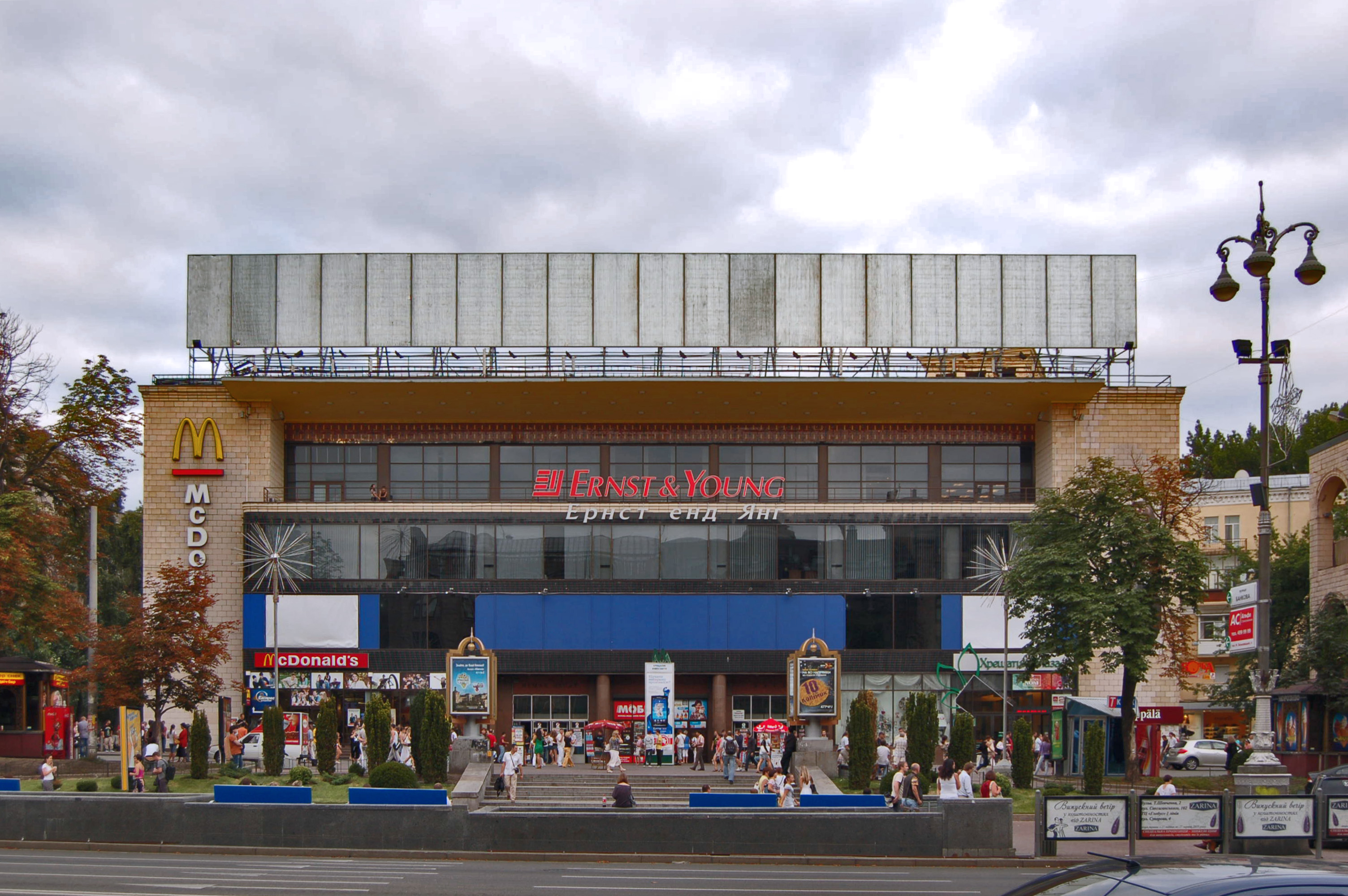 Станция метро «Крещатик», вестибюль выхода на улице Крещатик